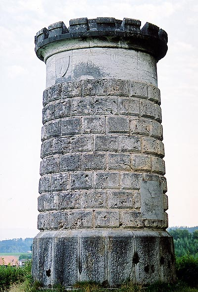 Denkmal für die Schlacht bei Laupen auf dem Bramberg oberhalb von Neuenegg